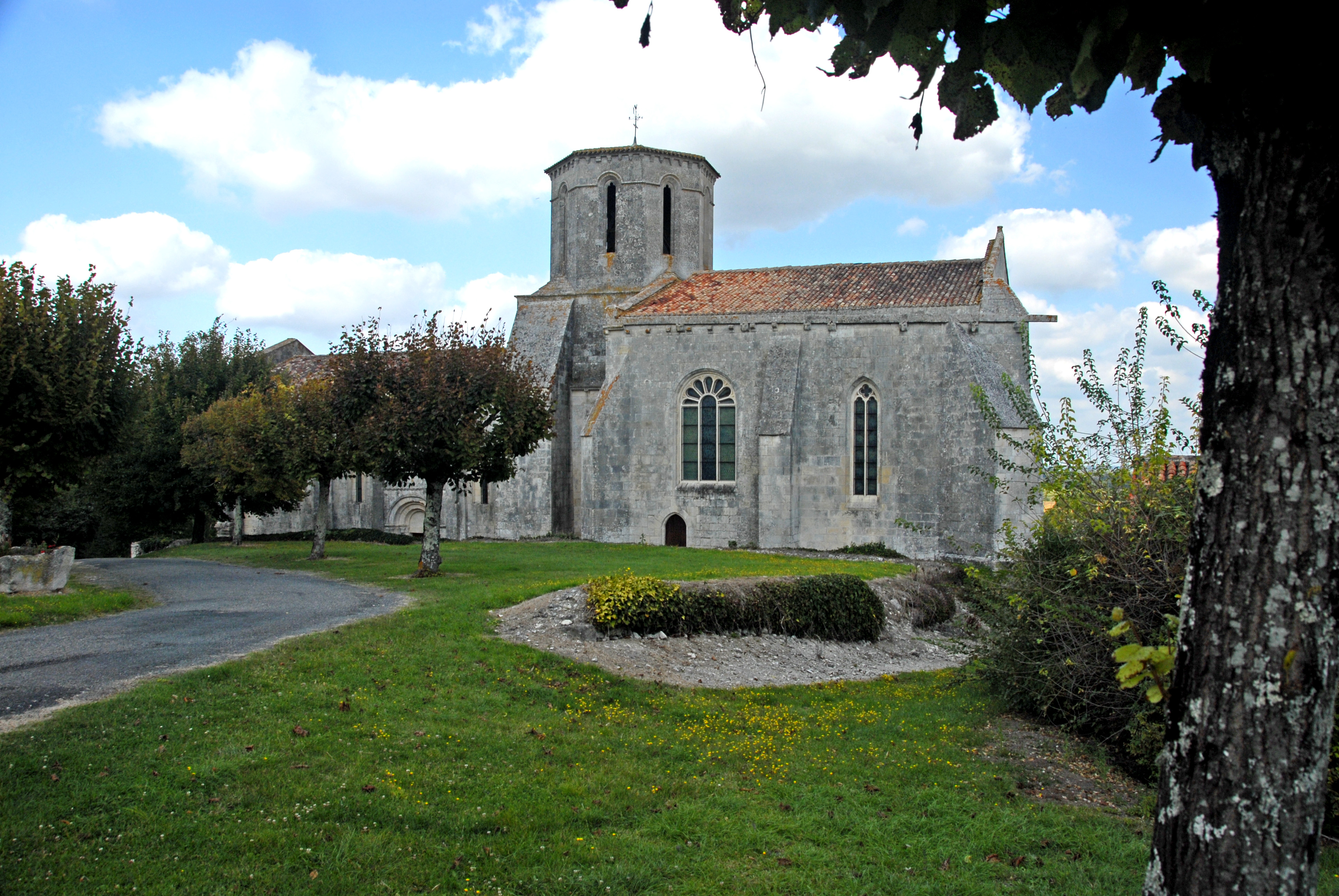 Echebrune, St.-Pierre, Südansicht